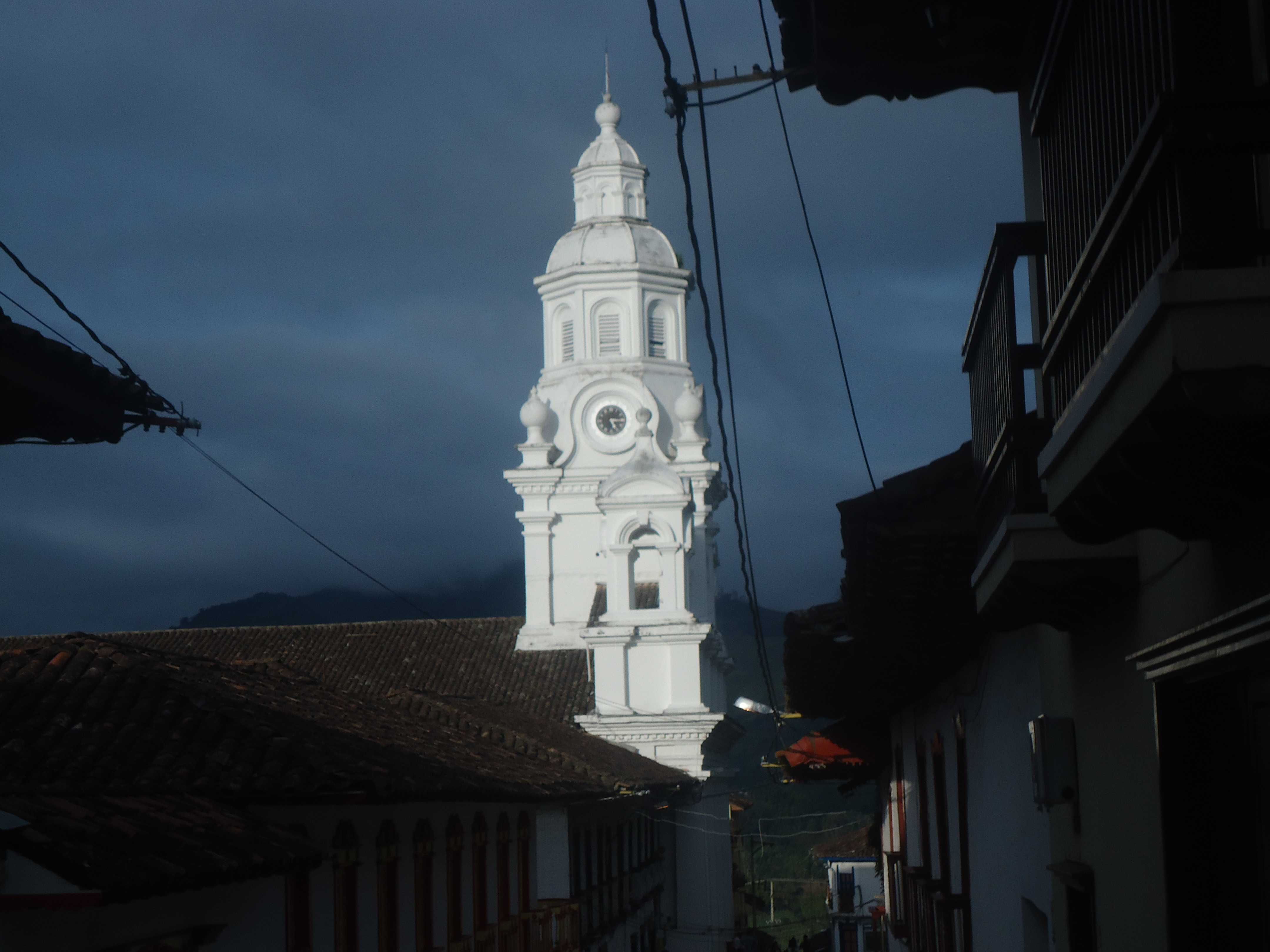 emblemática basílica en Salamina